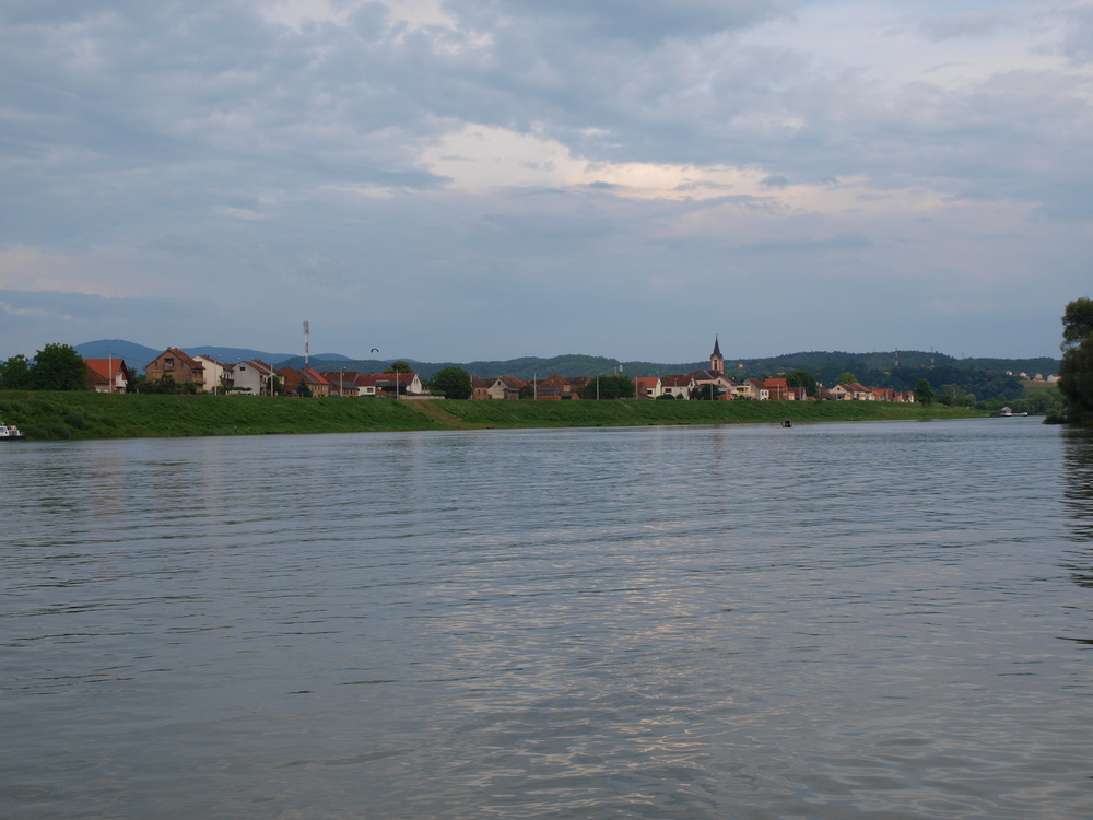 Naselje Davor u Brodsko-posavskoj županiji.